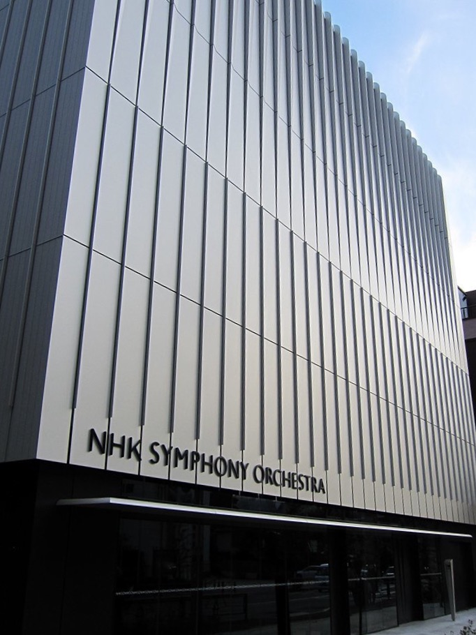 NHK交響楽団練習場